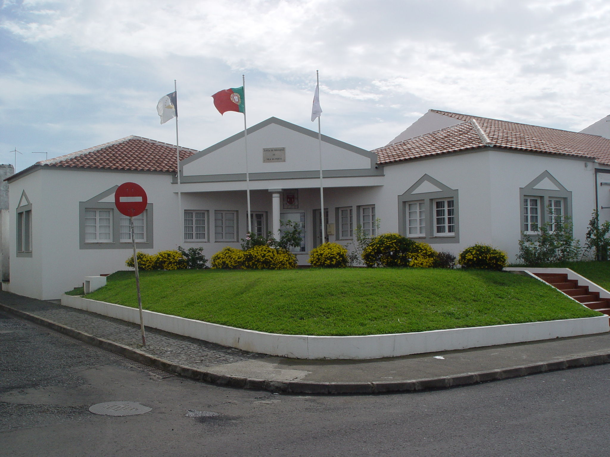 Junta de Freguesia de Vila do Porto, ilha de Santa Maria, Açores.